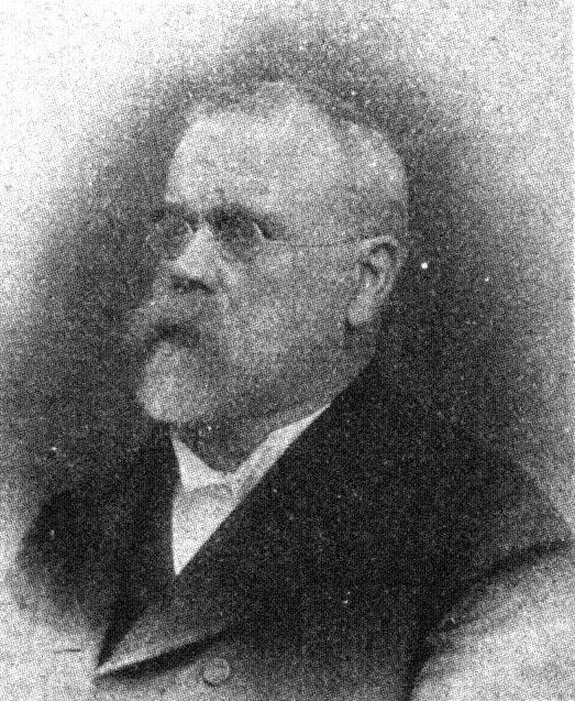 Österreichischer Politiker, Reichsratswahl 1907, Name siehe Dateiname